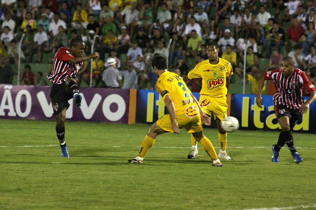 Borges do São Paulo chuta para fazer seu gol.